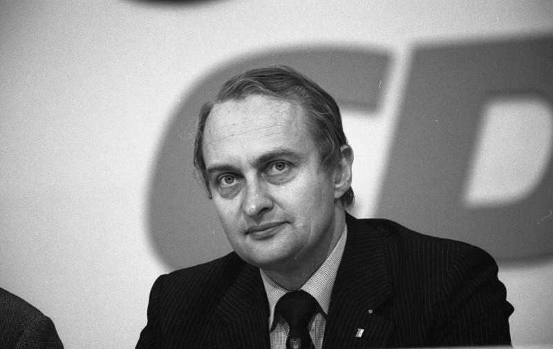 26. Bundesparteitag der CDU in der Friedrich-Ebert-Halle in Ludwigshafen 23.-25.10.1978